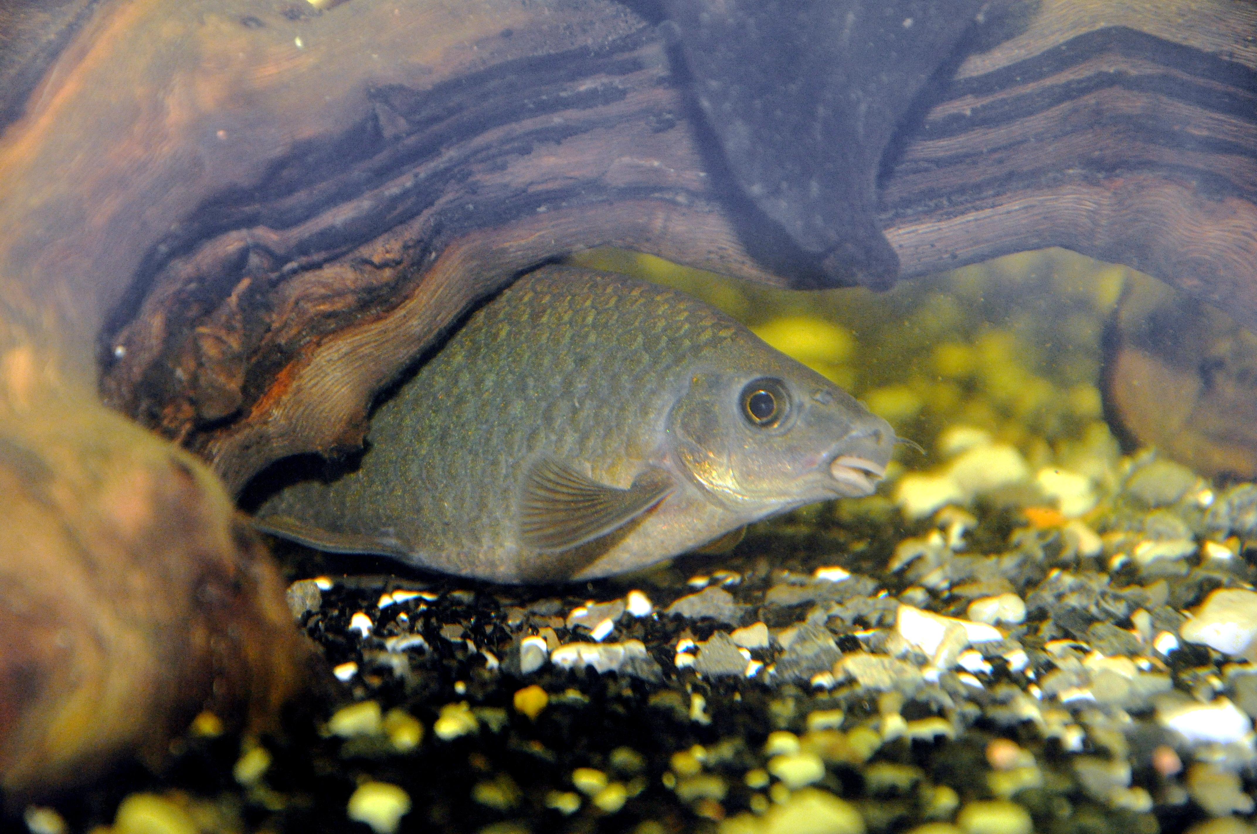 Frontansicht eines einjährigen Feuerschwanz-Fransenlipper